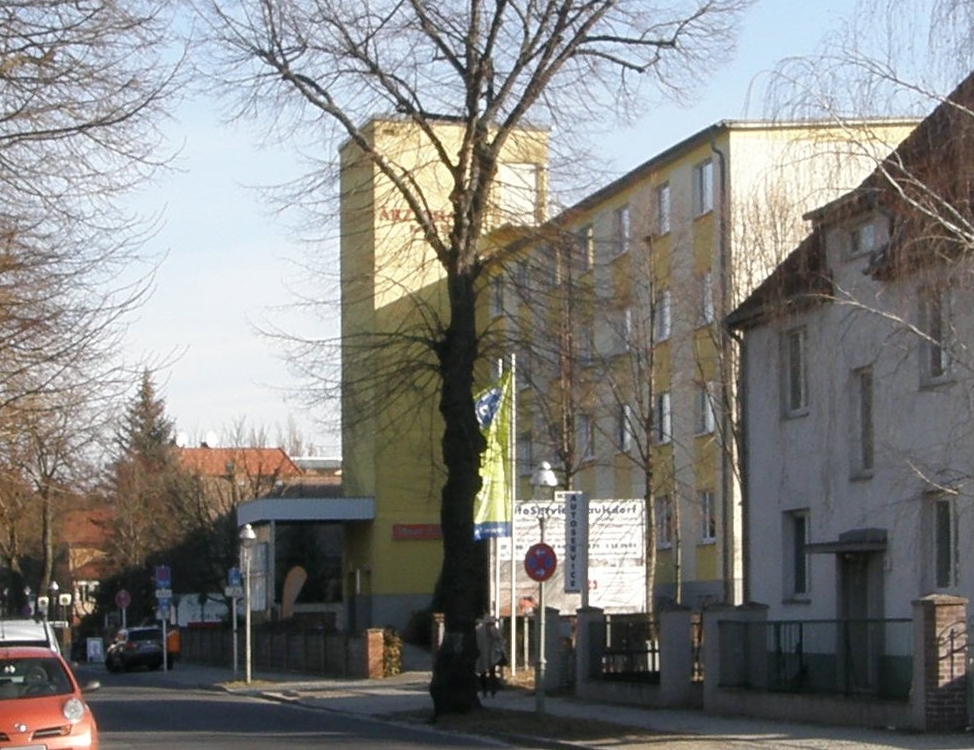 Ansicht von Teilen des Vivantes Klinikums Hellersdorf /Krankenhaus Kaulsdorf: ÄrztehausDieses Bild ist ein Ausschnitt aus Myslowitzer Kaulsdorf 2012-03-06 ama fec(3).jpg.